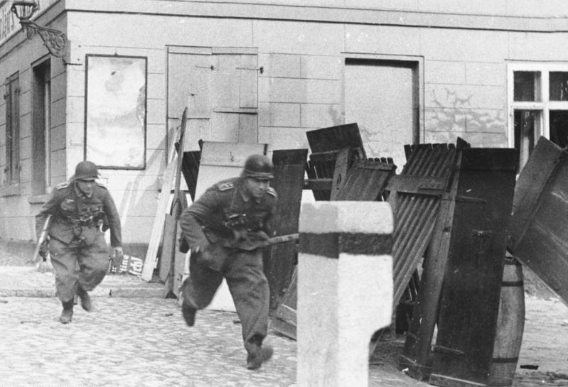 Pommern, Wollin, Infanterie bei Straßenkämpfen Zentralbild II.Weltkrieg 1939-1945 Dievenew-Front. Kämpfe in Wollin (Pommern) am 17.3.1945. Deutsche Soldaten überqueren eine Strassenkreuzung in der Stadt, die von sowjetischen Scharfschützen eingesehen wird. [Scherl Bilderdienst]